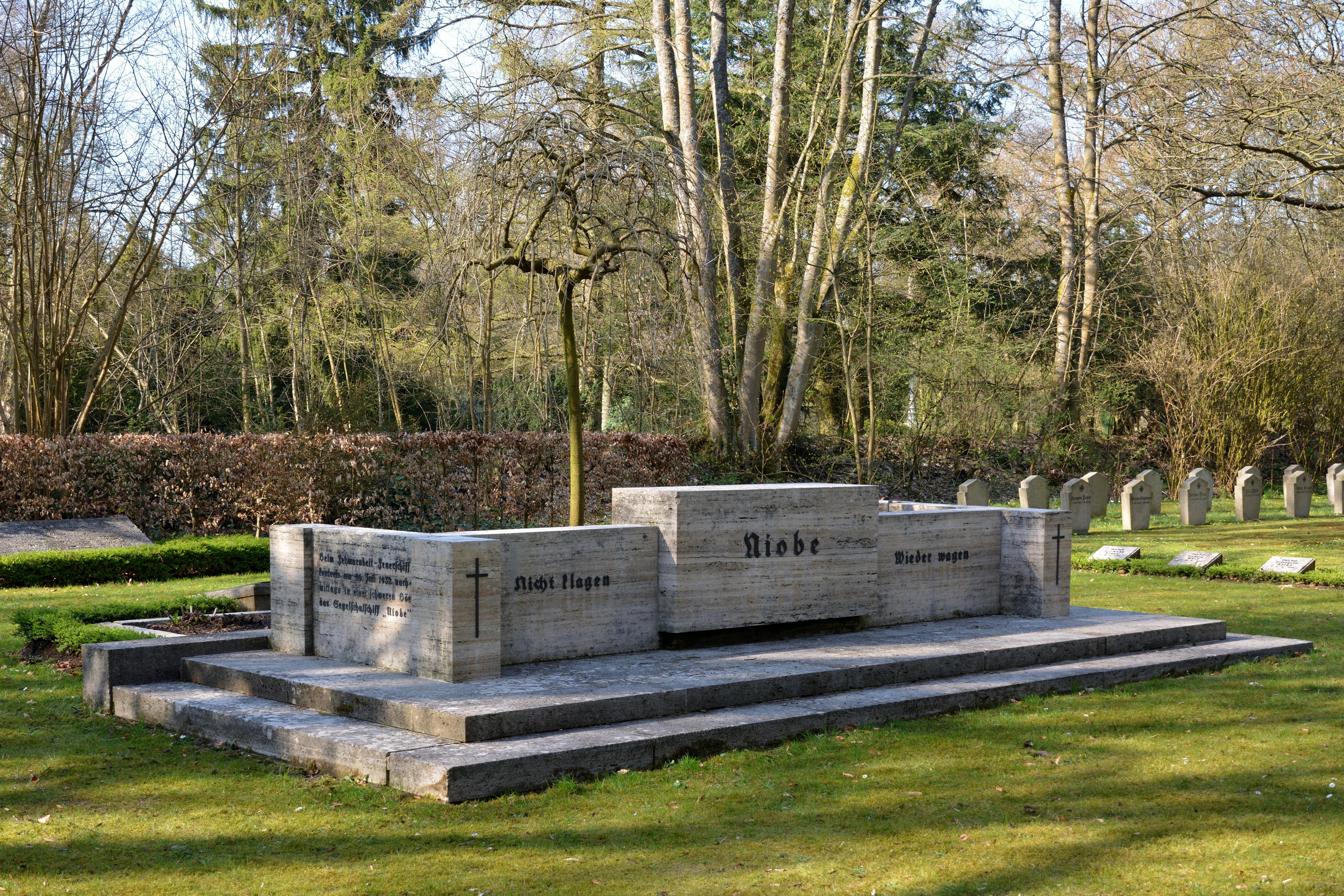 Impressionen vom Nordfriedhof Kiel